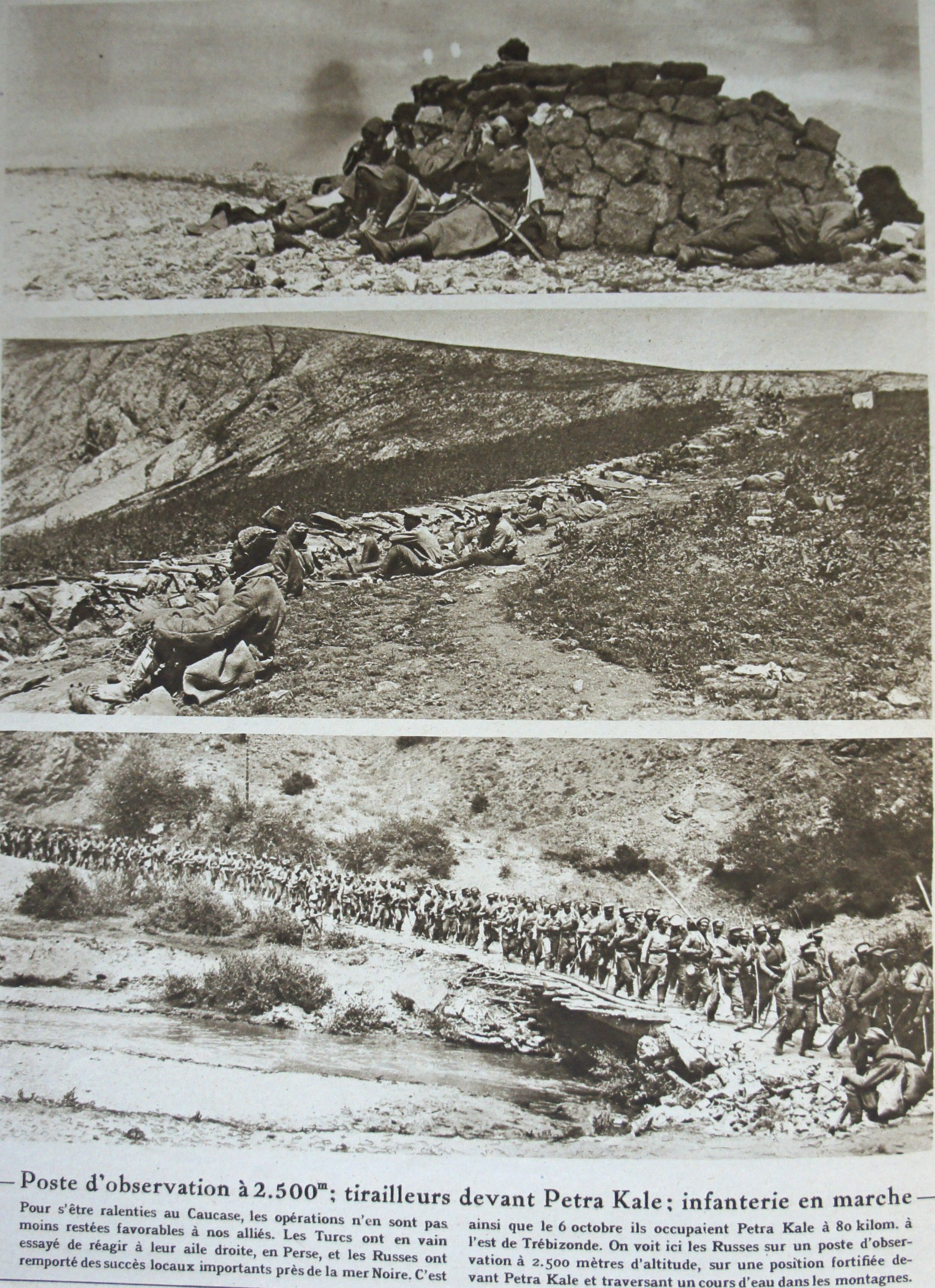 du journal "le miroir".